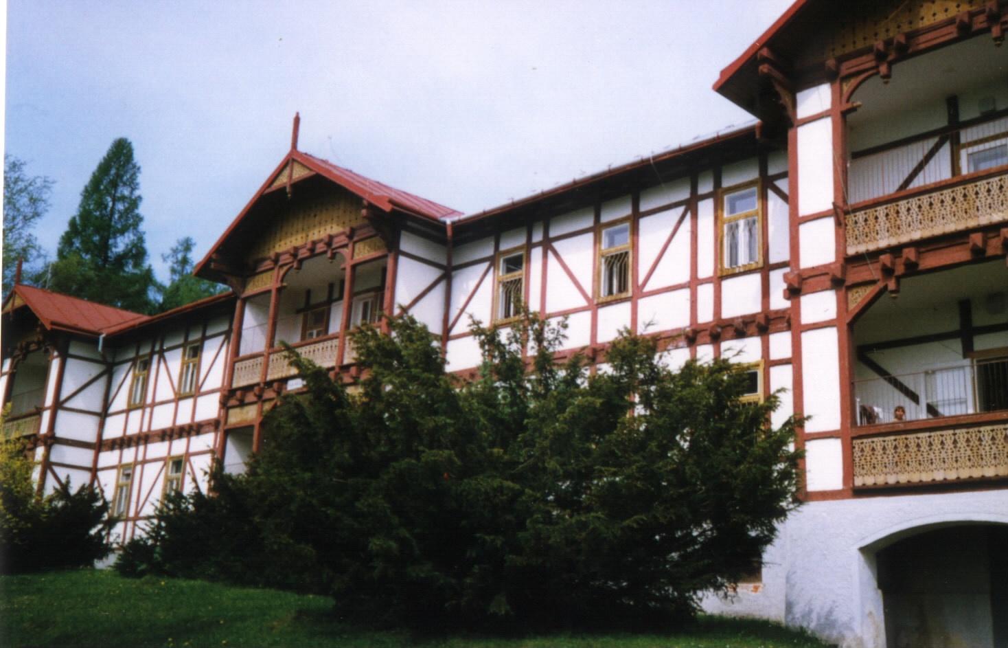 Vila Kollár, ktorá slúžila ako administratívna budova liečebného ústavu a potom ako liečebný pavilón